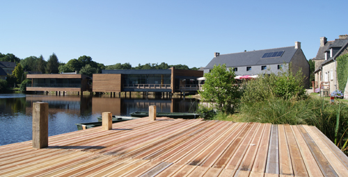 Musee de saint connan sur pilotis